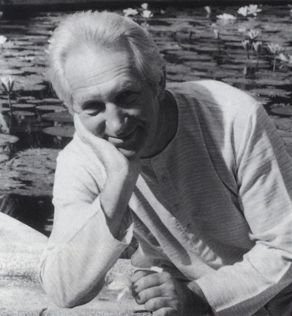 Henryk Skolimowski (b. 1930), polish philosopher